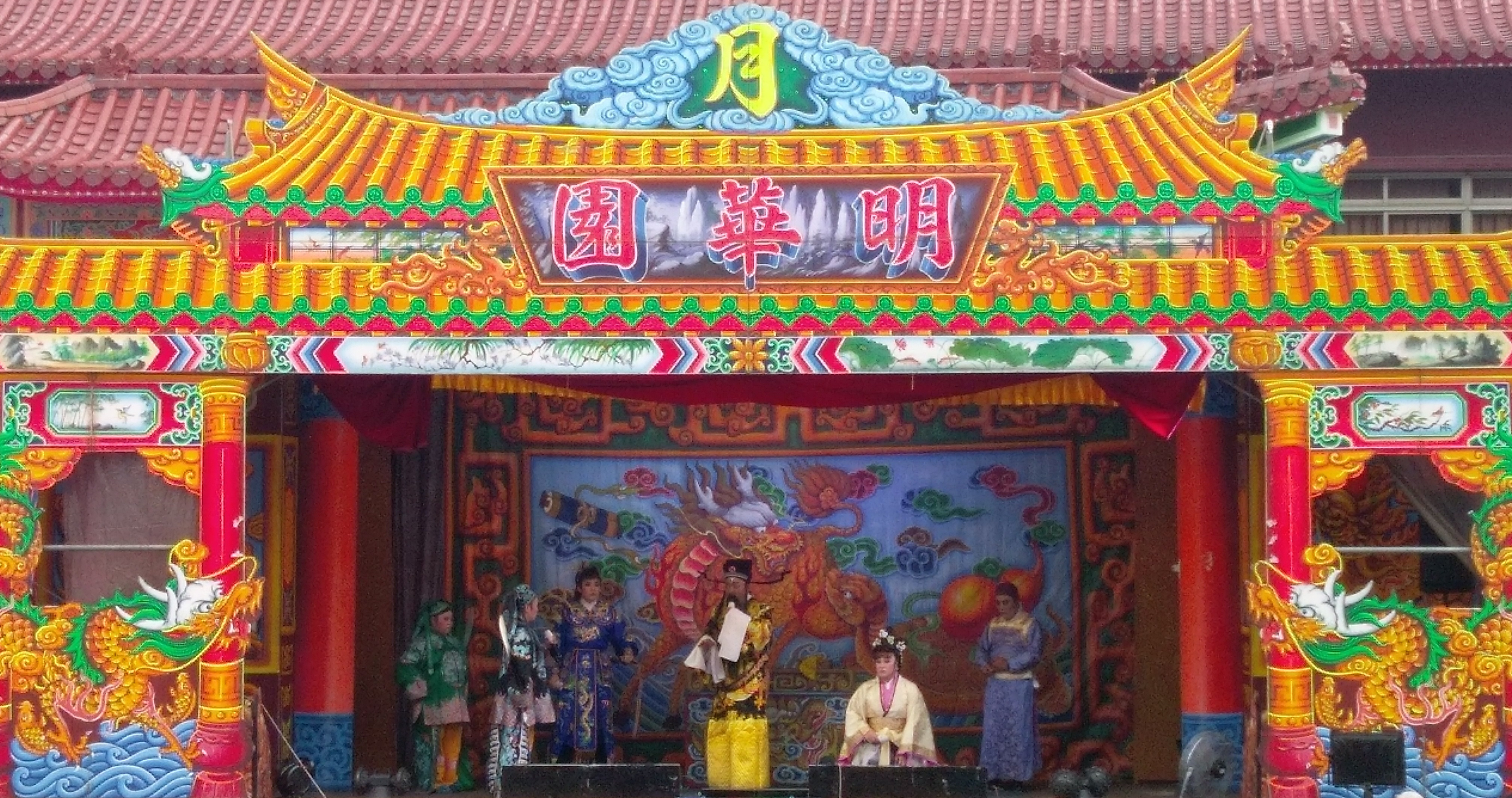 中文（台灣）: 明華園月字團演出